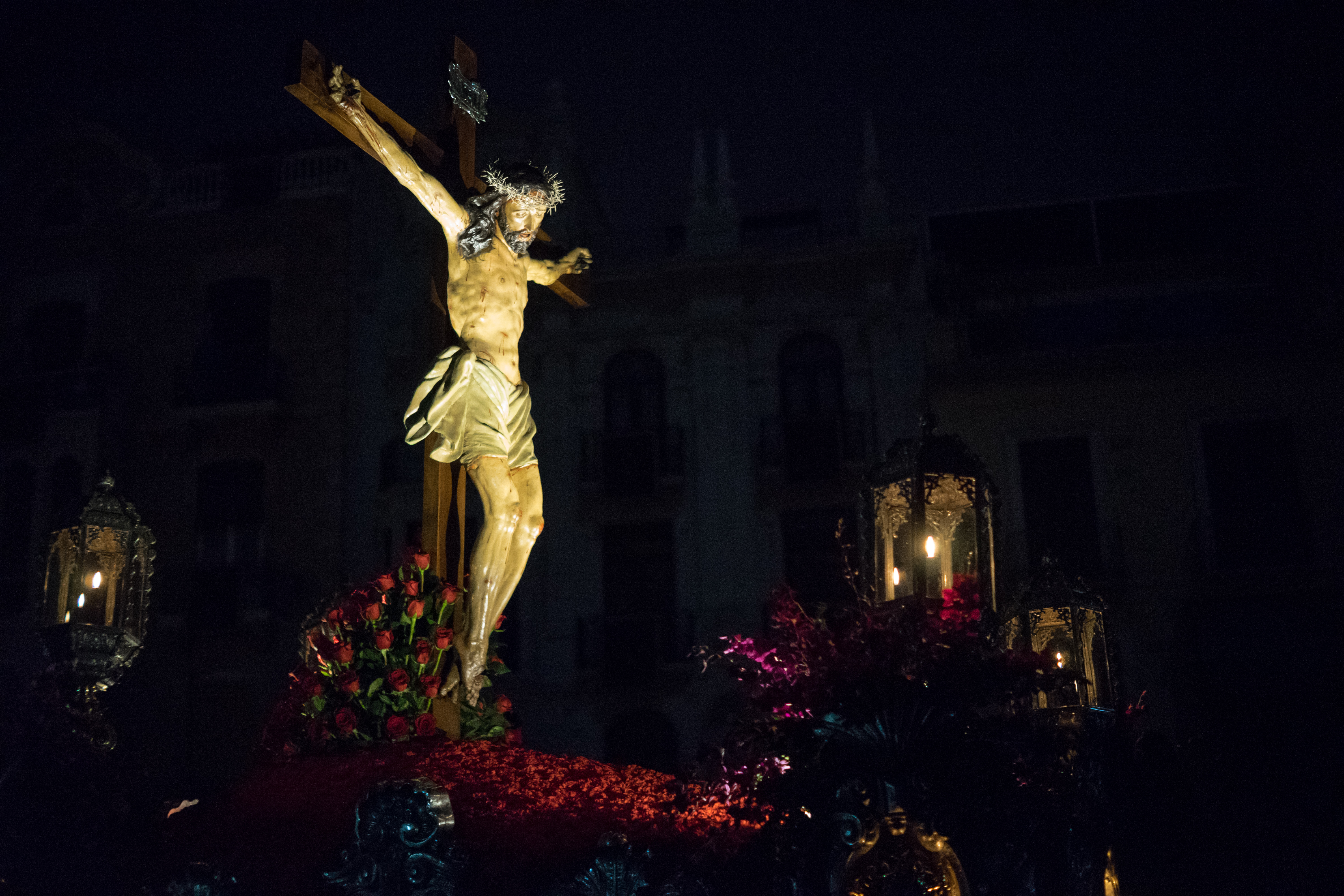 Cofradia del Refugio. Procesión del Silencio. Cristo del Refugio. This is a photography of a Folklore festival in Spain (Wikidata id Q5685566).